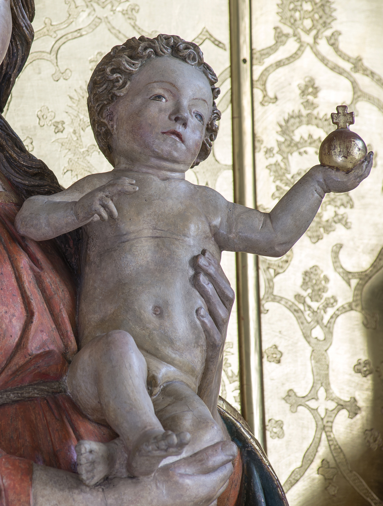 Das Jesuskind trägt die Weltkugel und segnet die Gläubigen